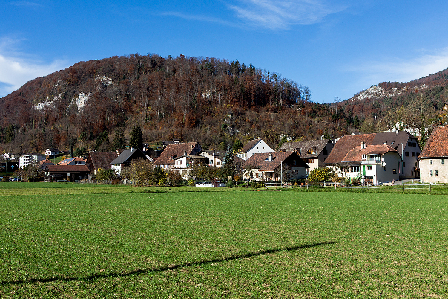 Blick von der Strasse (Basel-Delémont) hin nach Soyhières (JU)